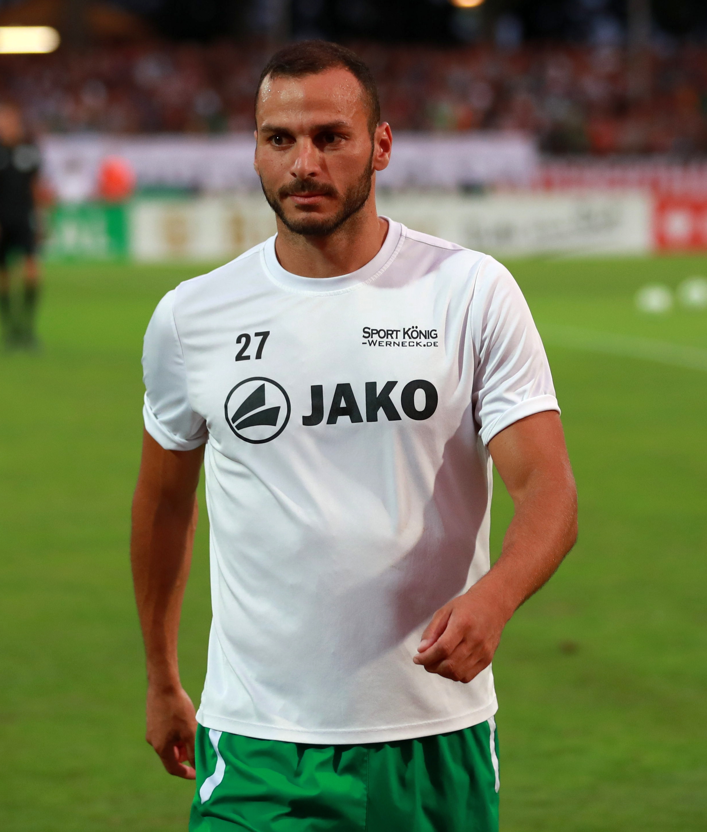 DFB-Pokal 2018/19, 1. Hauptrunde: 1. FC Schweinfurt 05 gegen FC Schalke 04 0:2 (0:1)